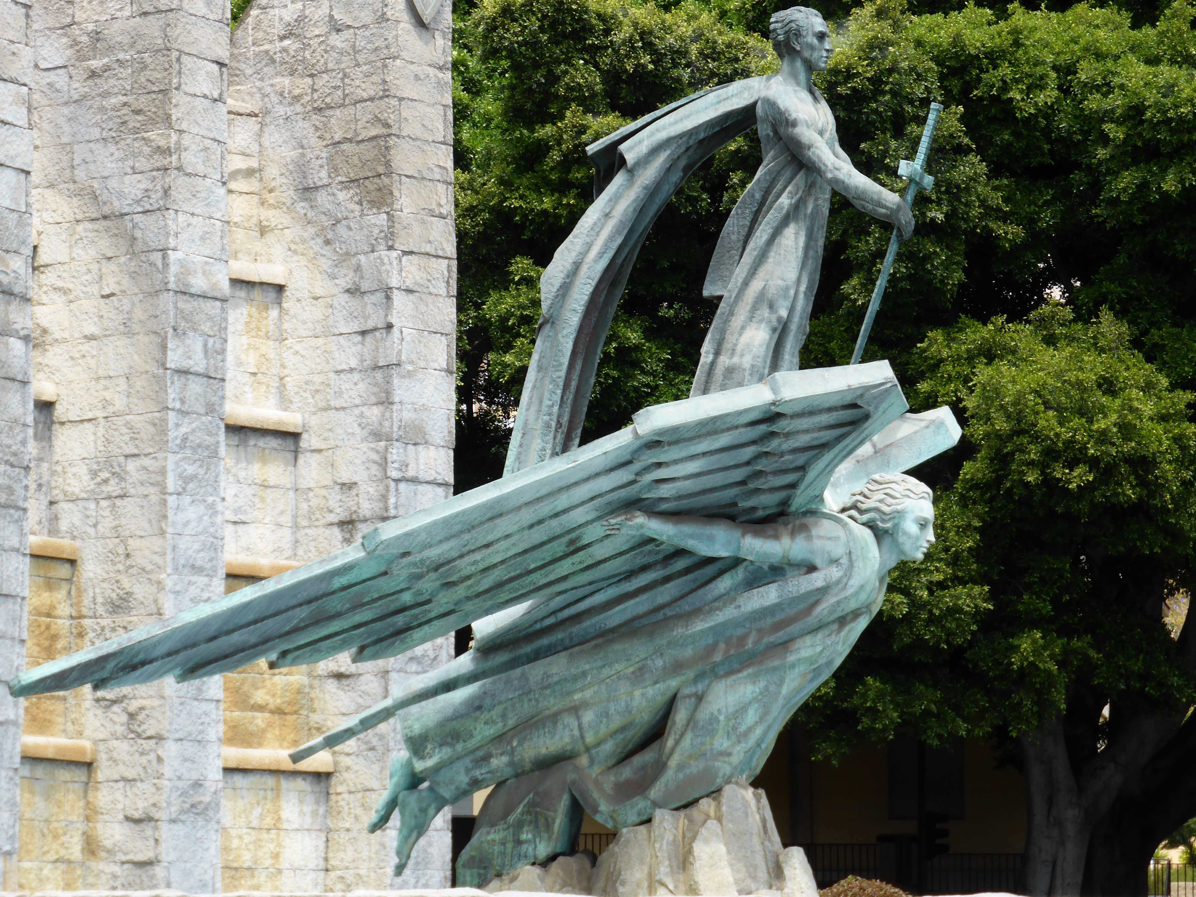 Monumento del Ángel, dedicado alegóricamente a Franco. Obra del escultor español Juan de Ávalos y Taborda. Se inauguró en 1966. Este monumento es también denominado "Monumento a Franco". Se mantiene en su emplazamiento original, al final de la Rambla de Santa Cruz, esquina con la Avenida de Anaga. Se considera que tiene valor histórico y artístico.